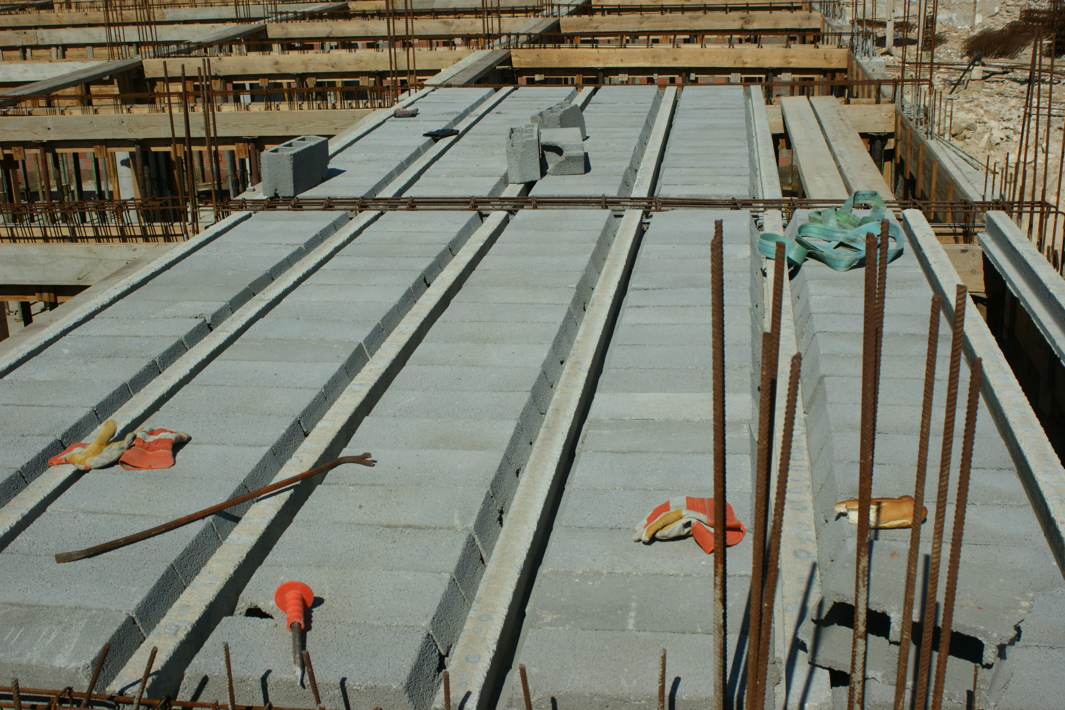 Positionnement des poutrelles et entrevous